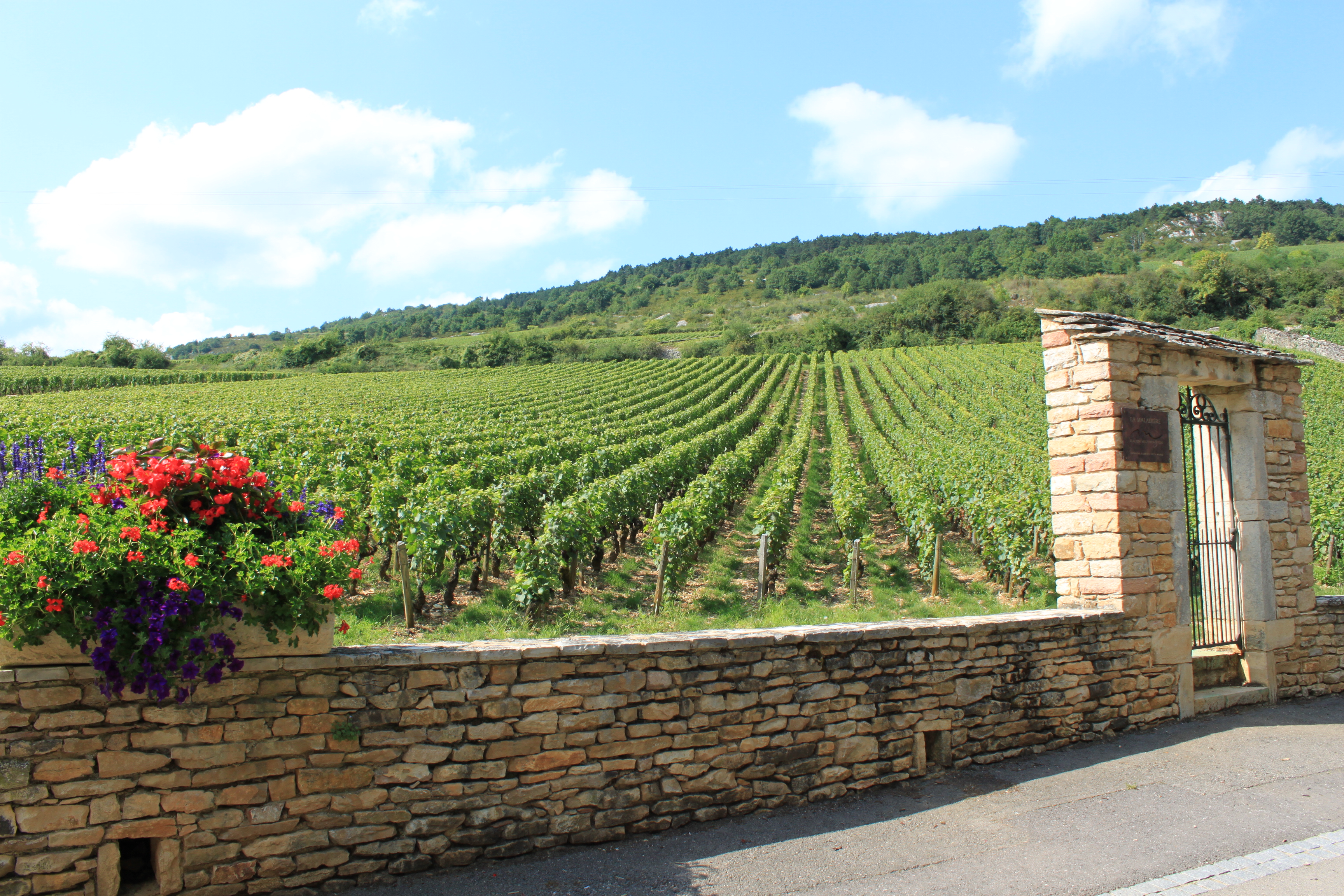 Santenay, Côte d'Or, Bourgogne, France